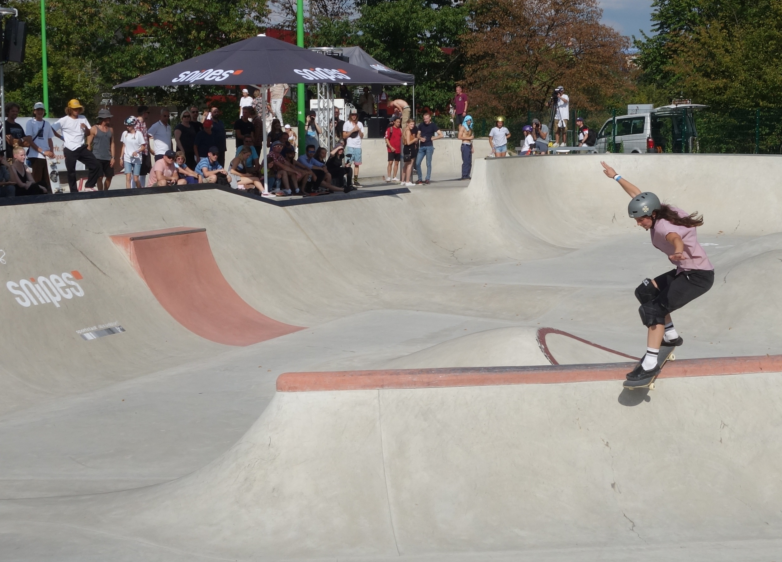 Skatepark Düsseldorf-Eller, Deutsche Skateboard-Meisterschaften 2019, Vorentscheidungen.